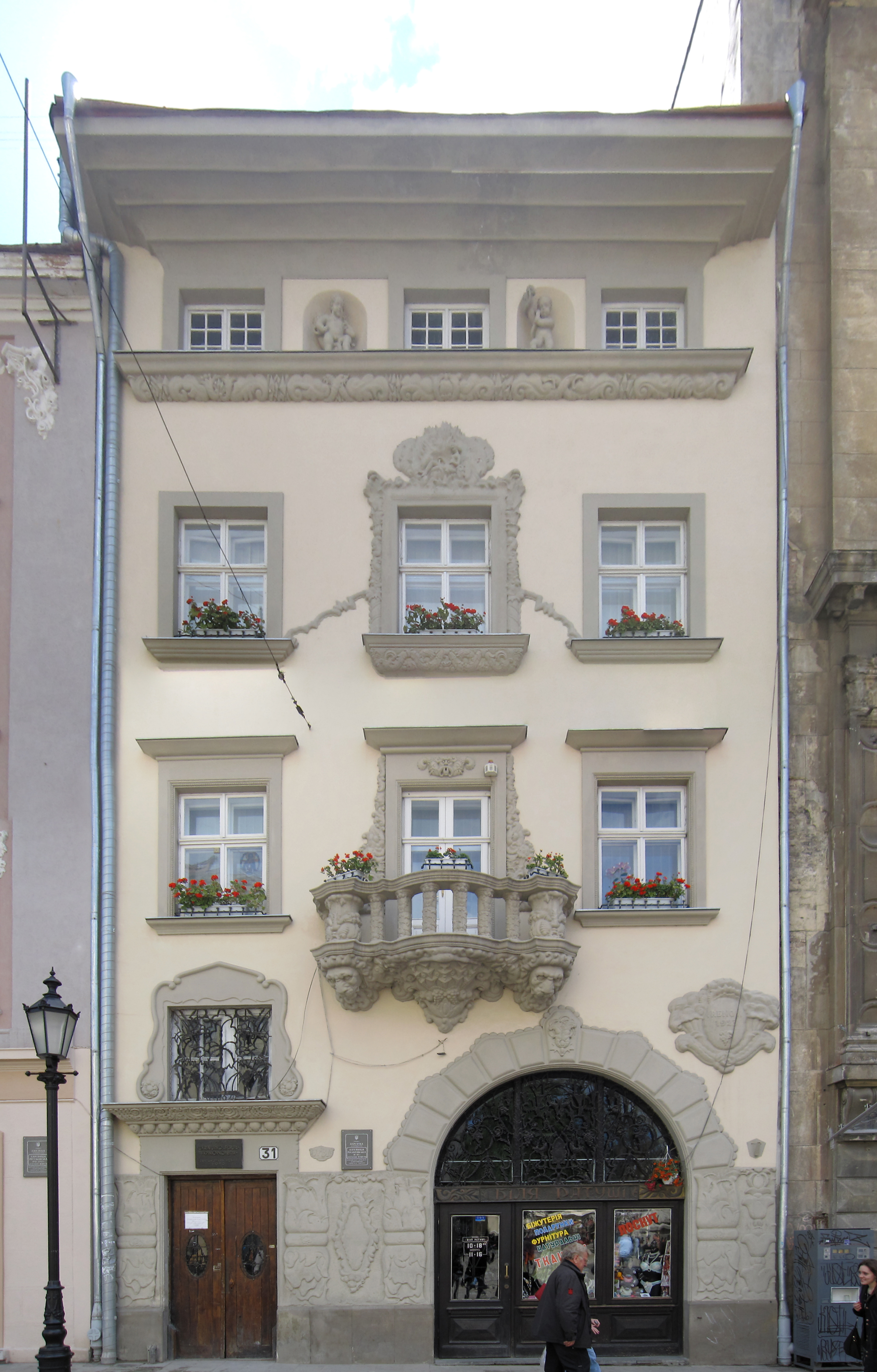 Rynek of LwowRynek of Lwow